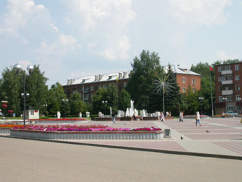 Автор - Lite